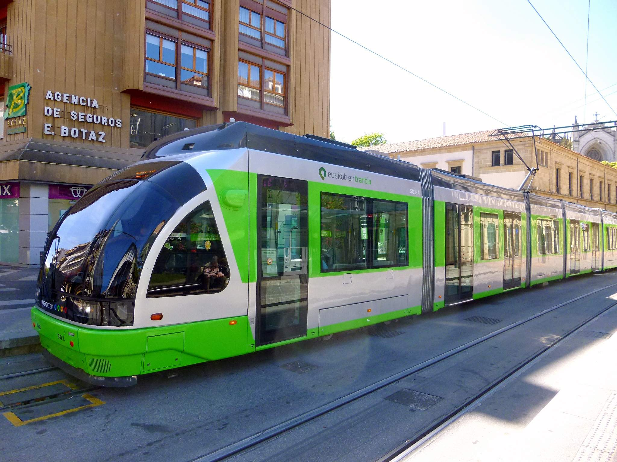 Tranvía de Vitoria